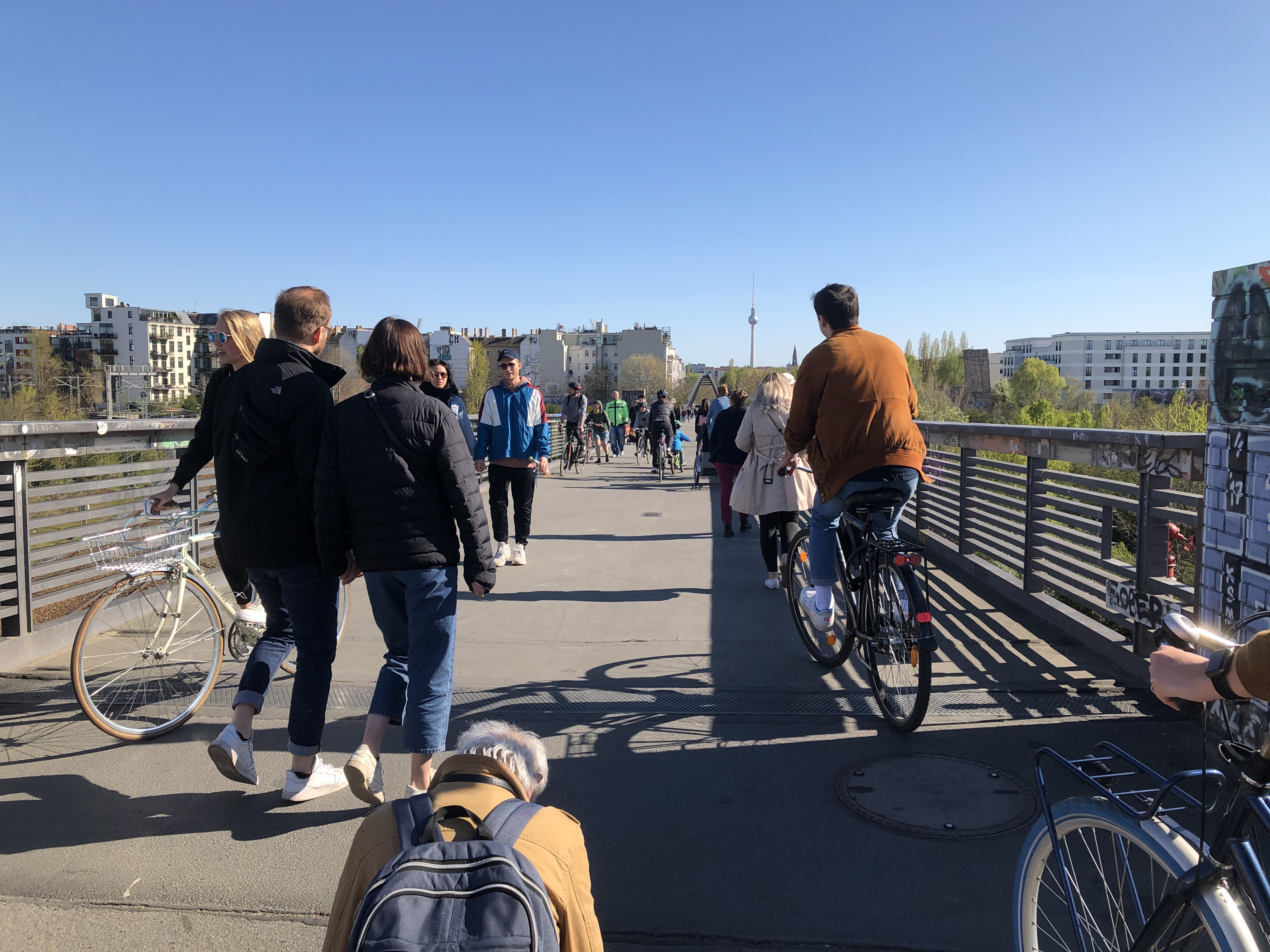 Der Sicherheitsabstand von 1,5 m kann hier nicht eingehalten werden. Das schöne Wetter macht ihn voll.